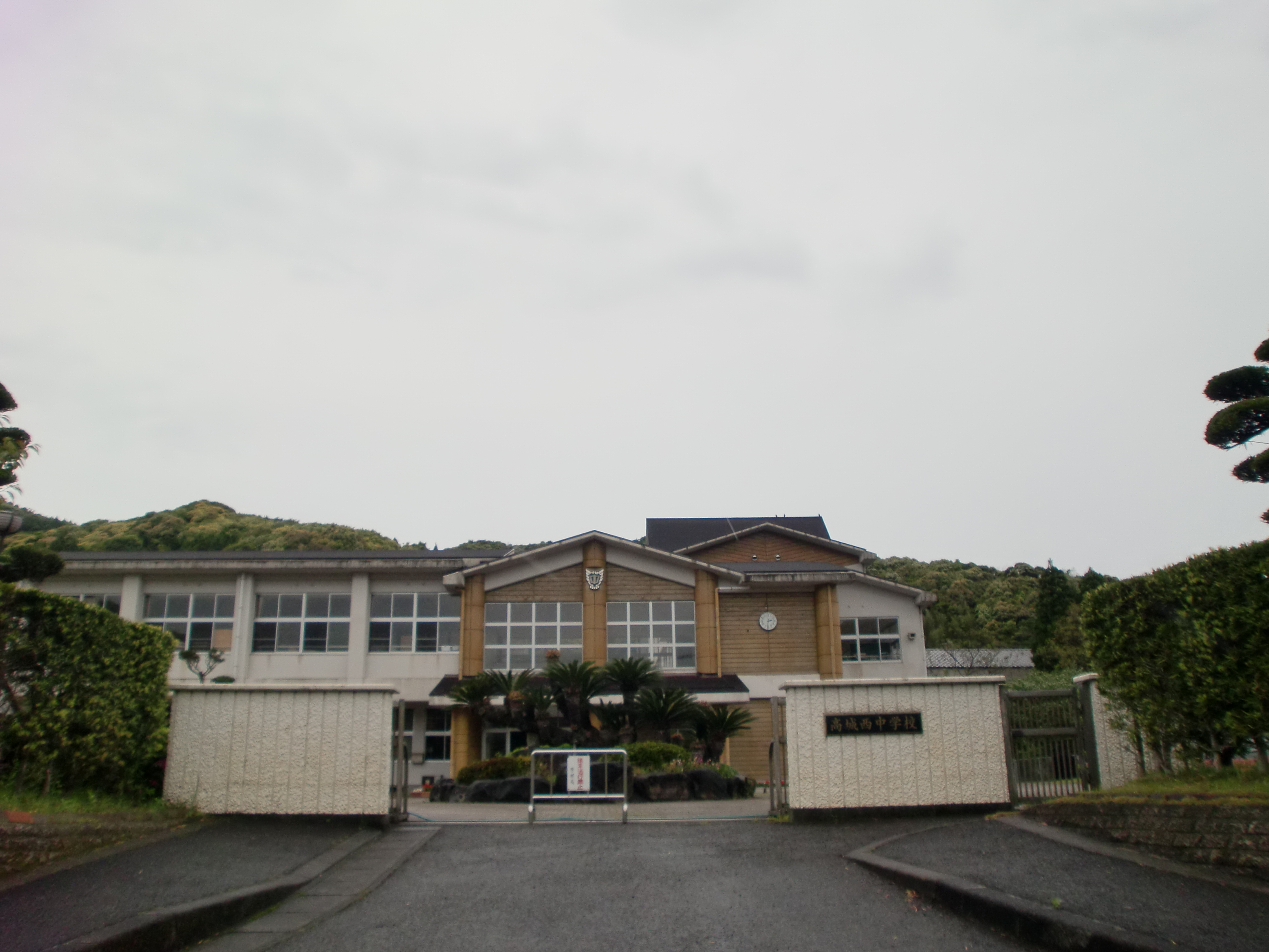 薩摩川内市立高城西中学校の外観。